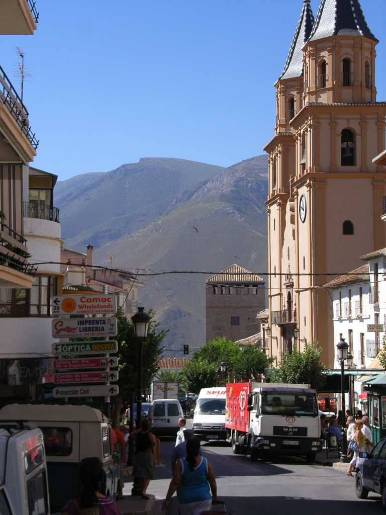 Una calle de Órgiva (Granada, España).